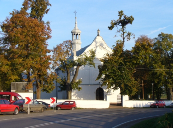 Niegardów - rzymskokatolicki kościół parafialny pw. św. Jakuba Starszego, 1578, XIX